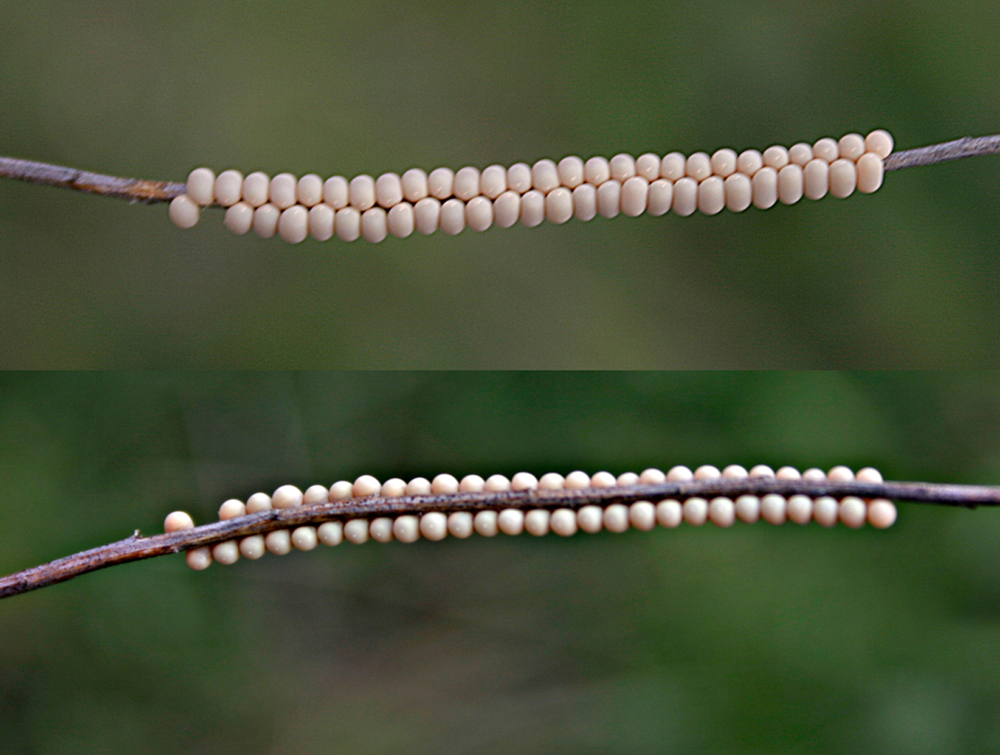 Eichkogel This media shows the nature reserve in Lower Austria with the ID 3.